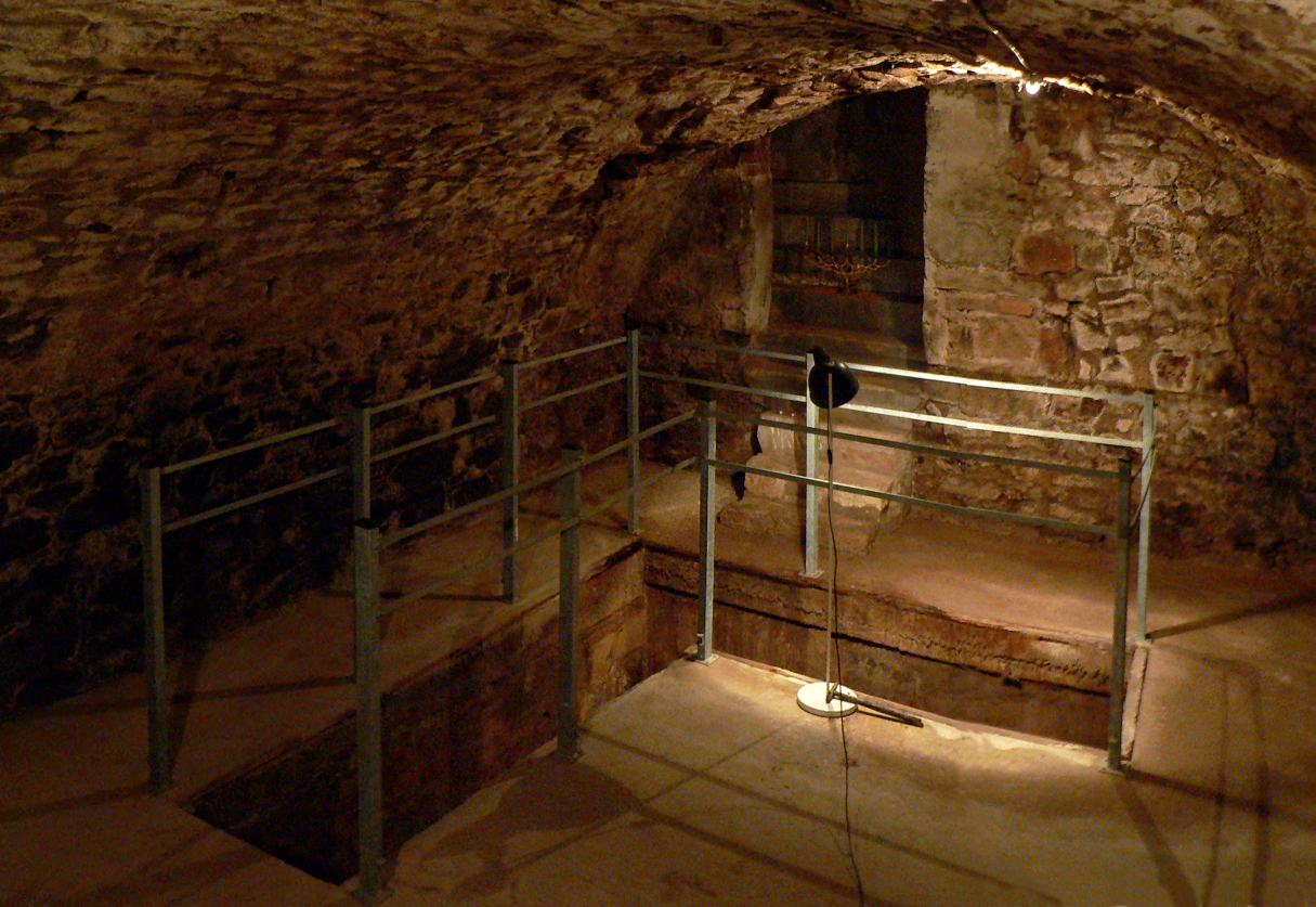 Jüdisches Tauchbad, Mikwe, in Hann. Münden, Grundstück Hinter der Stadtmauer 23